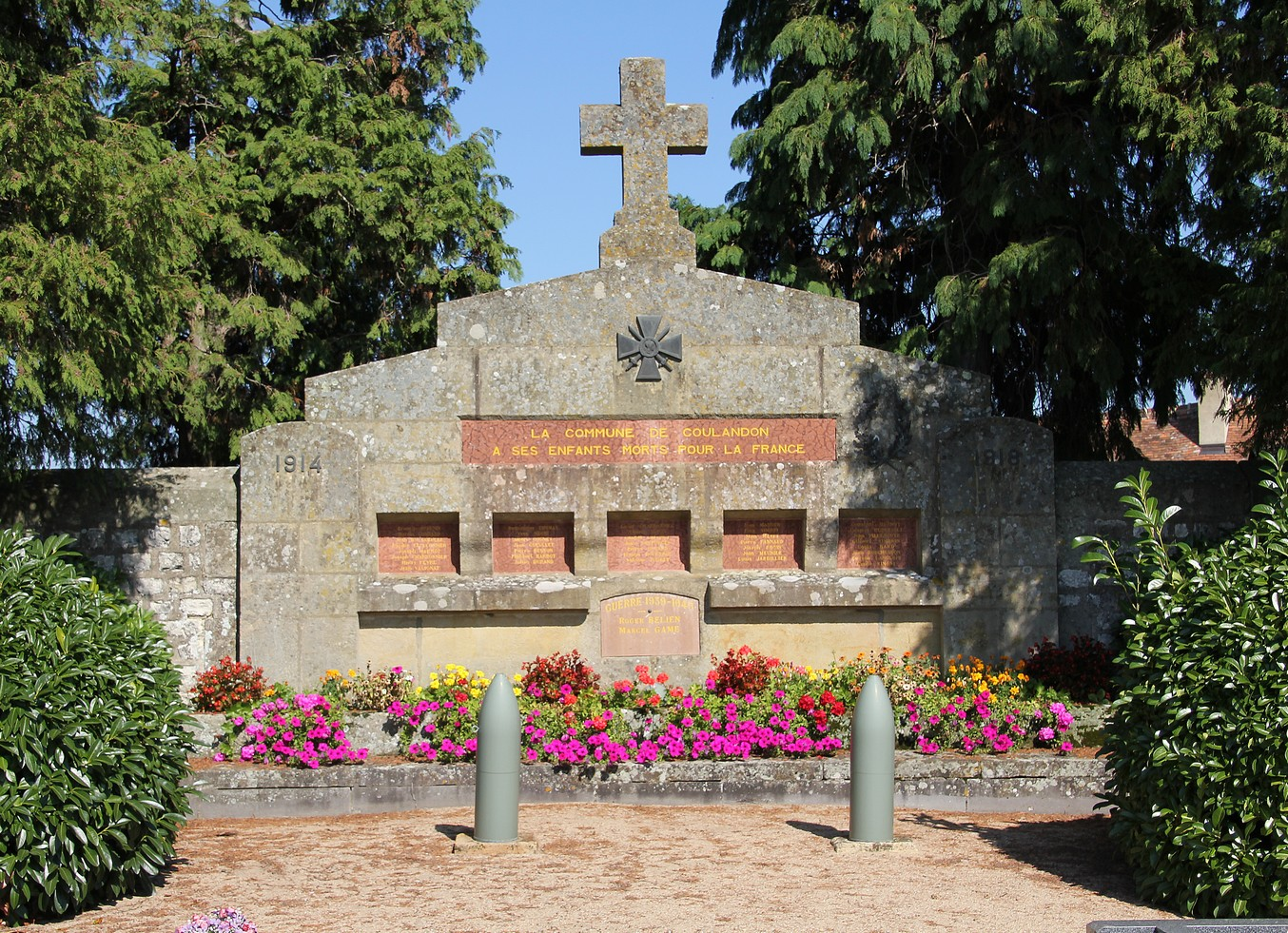 Monument aux Morts de Coulandon (03)